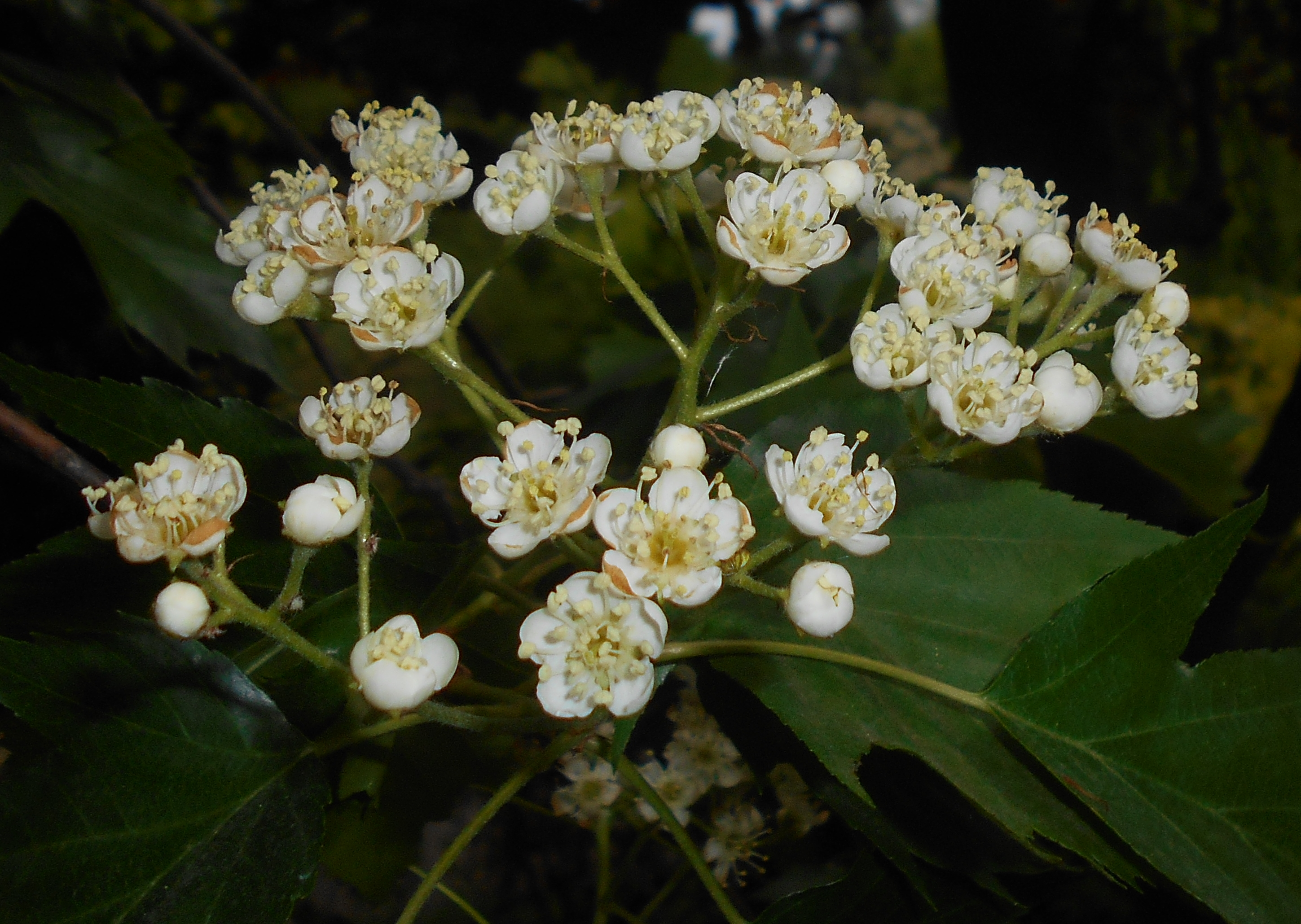 Jarząb brekinia (Sorbus torminalis), Ogród Botaniczny UMCS w Lublinie